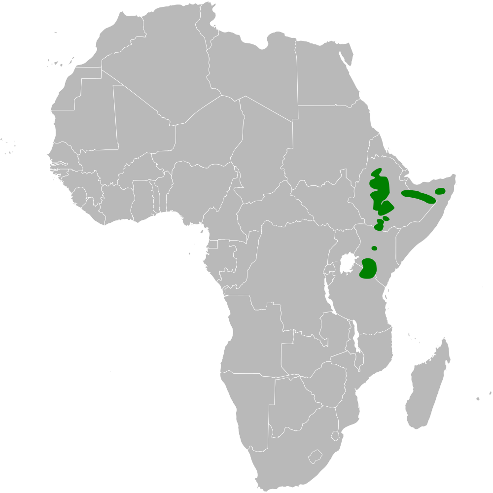 Calandrella somalica distribution map, based on